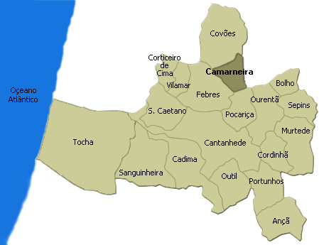 Localização da freguesia da Camarneira no concelho de Cantanhede.